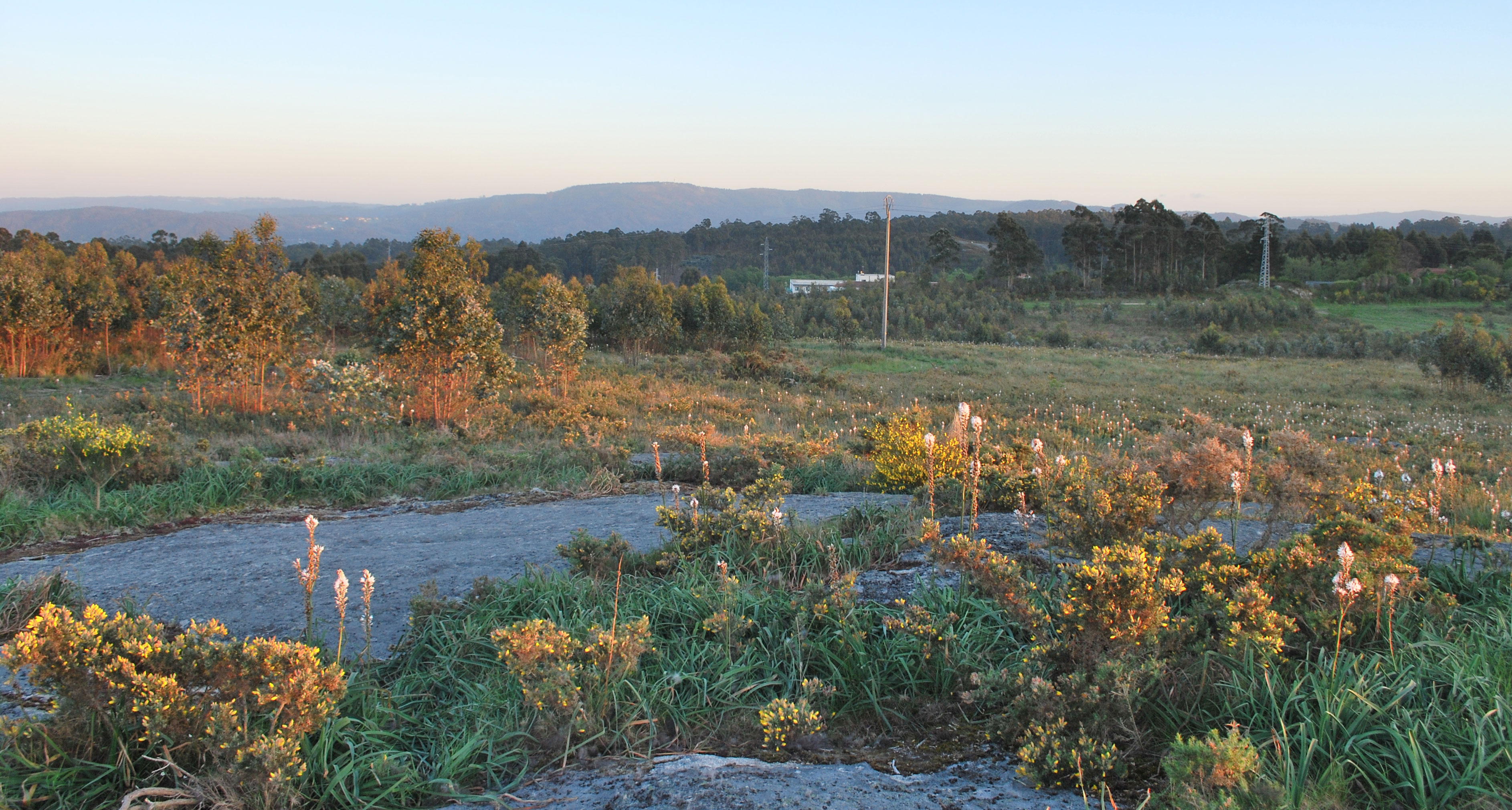 O monte Xalo visto dende os altos da Zapateira